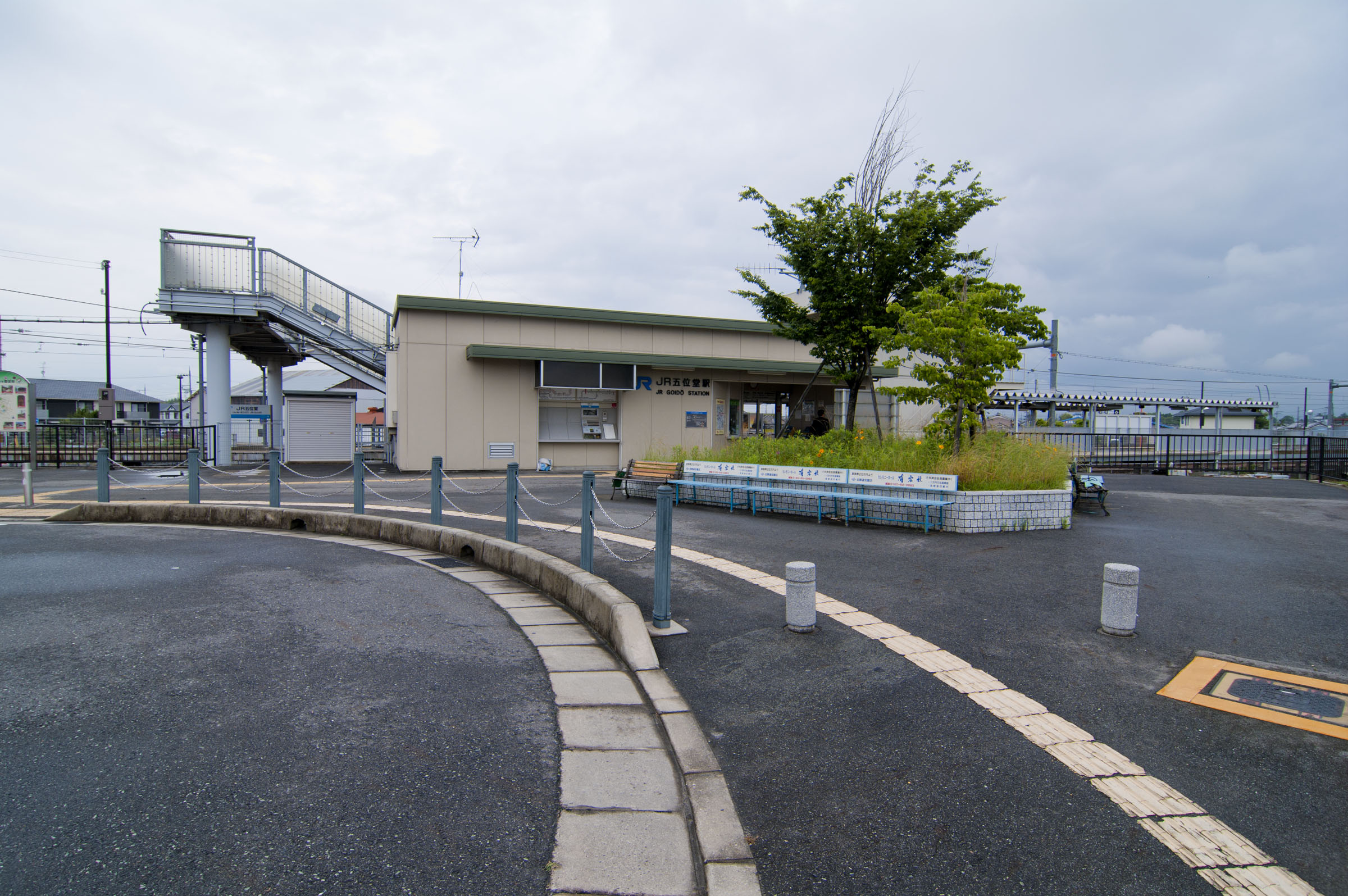 西日本旅客鉄道和歌山線JR五位堂駅駅舎写真